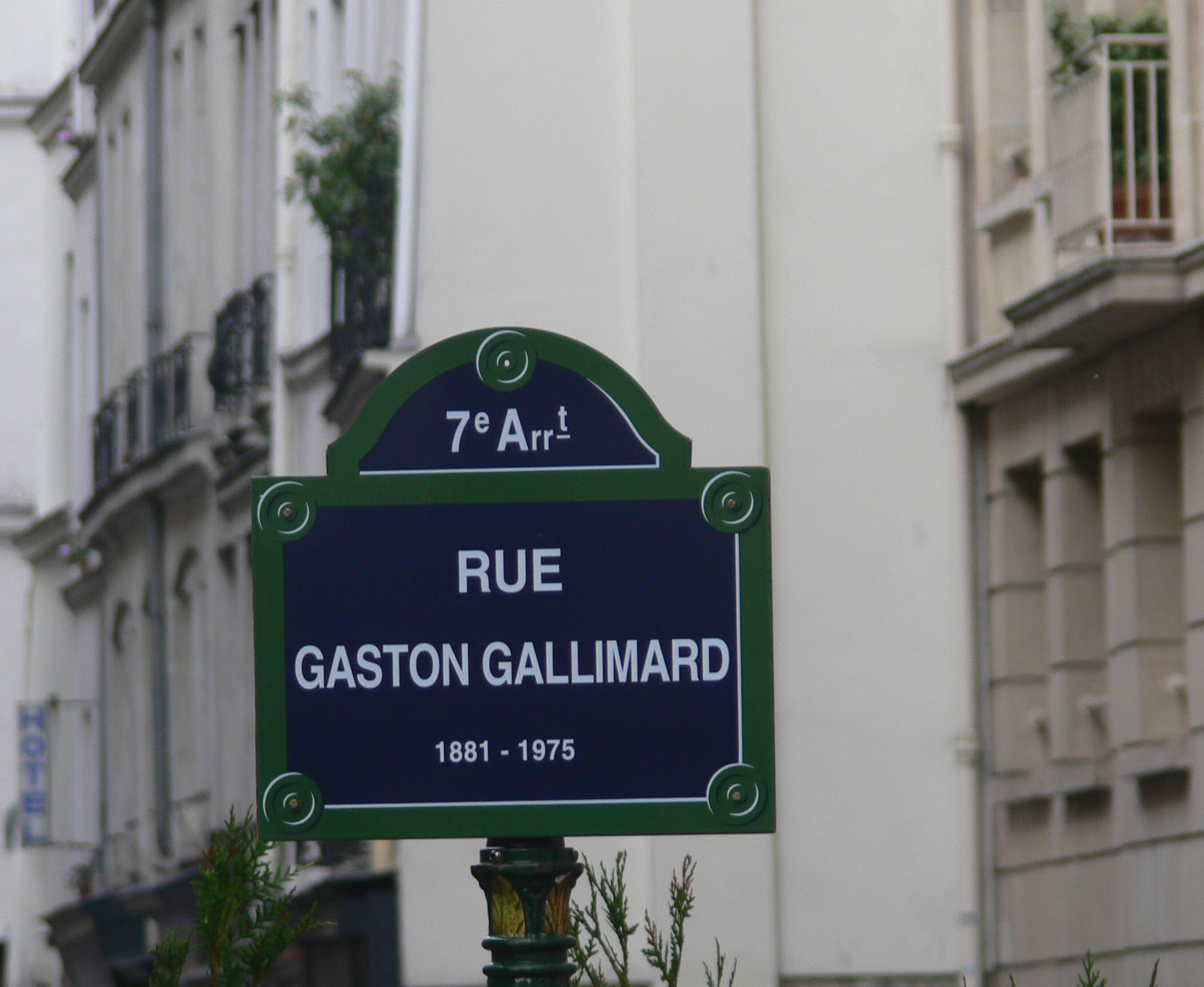 Inauguration de la rue Gaston-Gallimard sur une partie de la rue Sébastien-Bottin (15 juin 2011), par Bertrand Delanoé, maire de Paris, et Antoine Gallimard, petit-fils de la personne honorée.